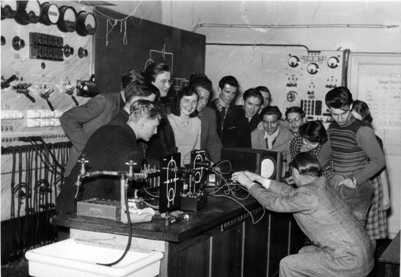 Pestalozzi-Schule in Idstein/Taunus